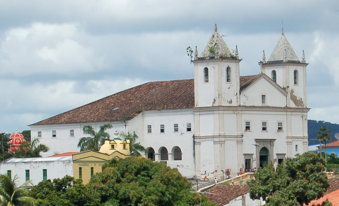 Maragojipe Ba. Panorâmica. Foto: Rita Barreto - Setur